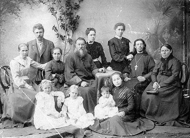 Смотритель Сапожковского духовного училища с 1874 года